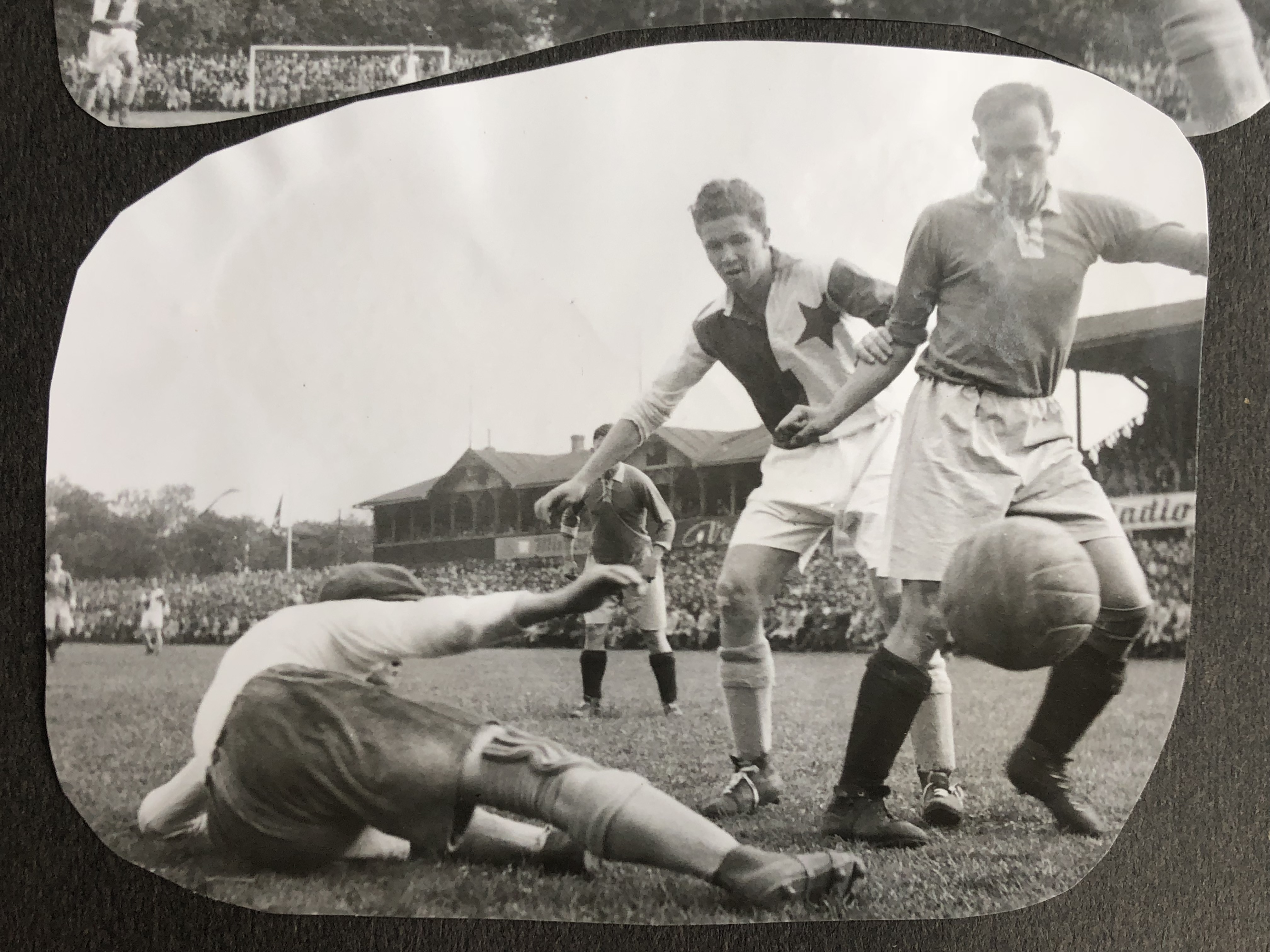 Jiří Žďárský, zápas za Slávii